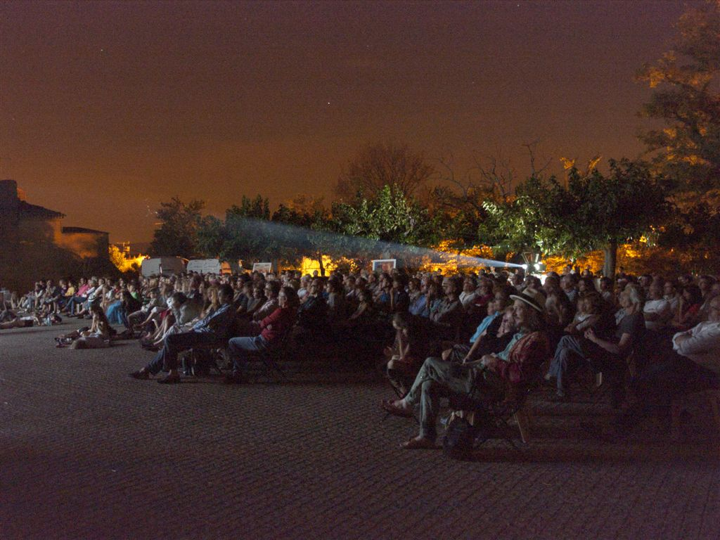 Festival de cinema de plein air de visan